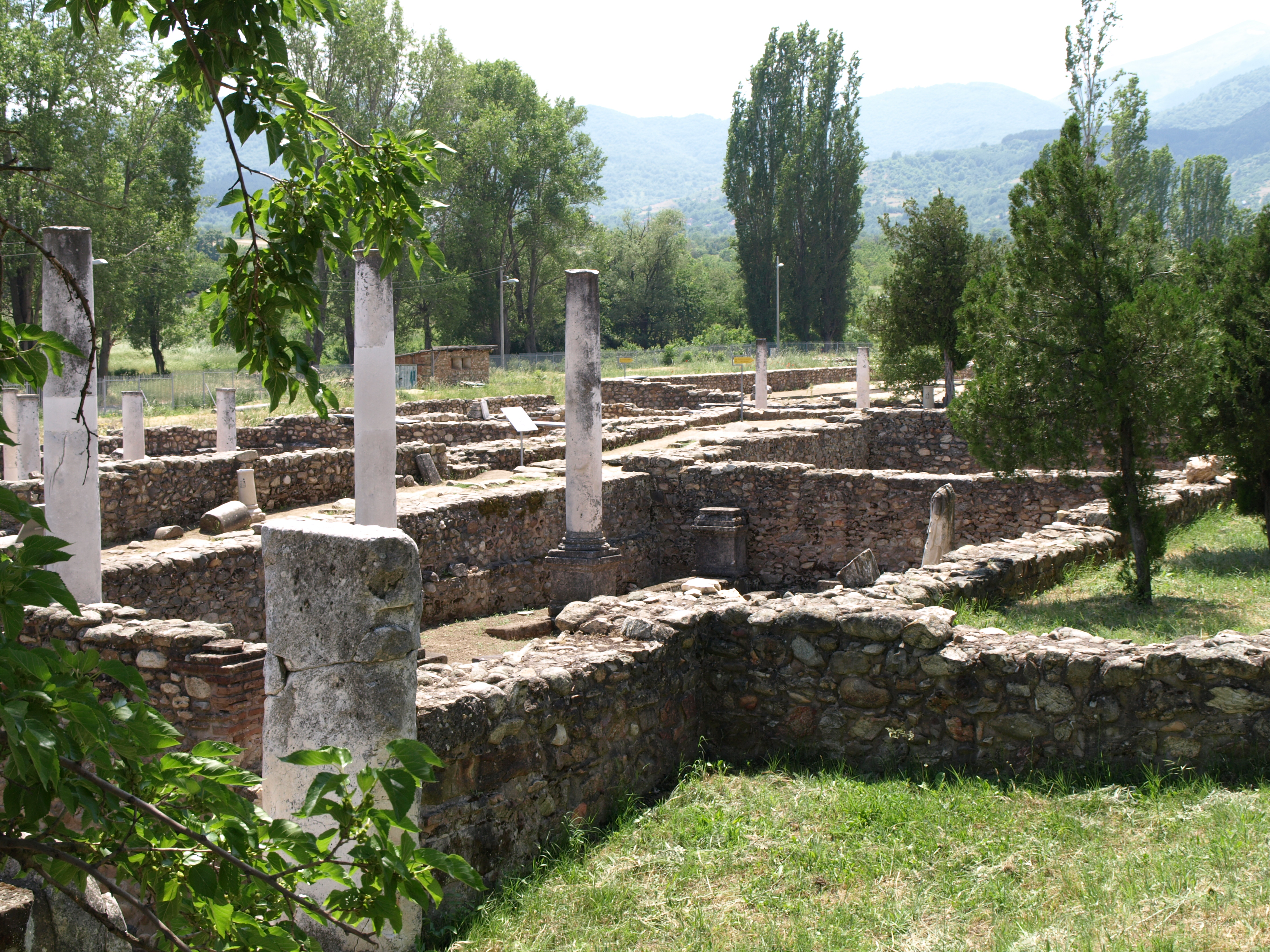 Ausgrabungen in Herakleia bei Bitola